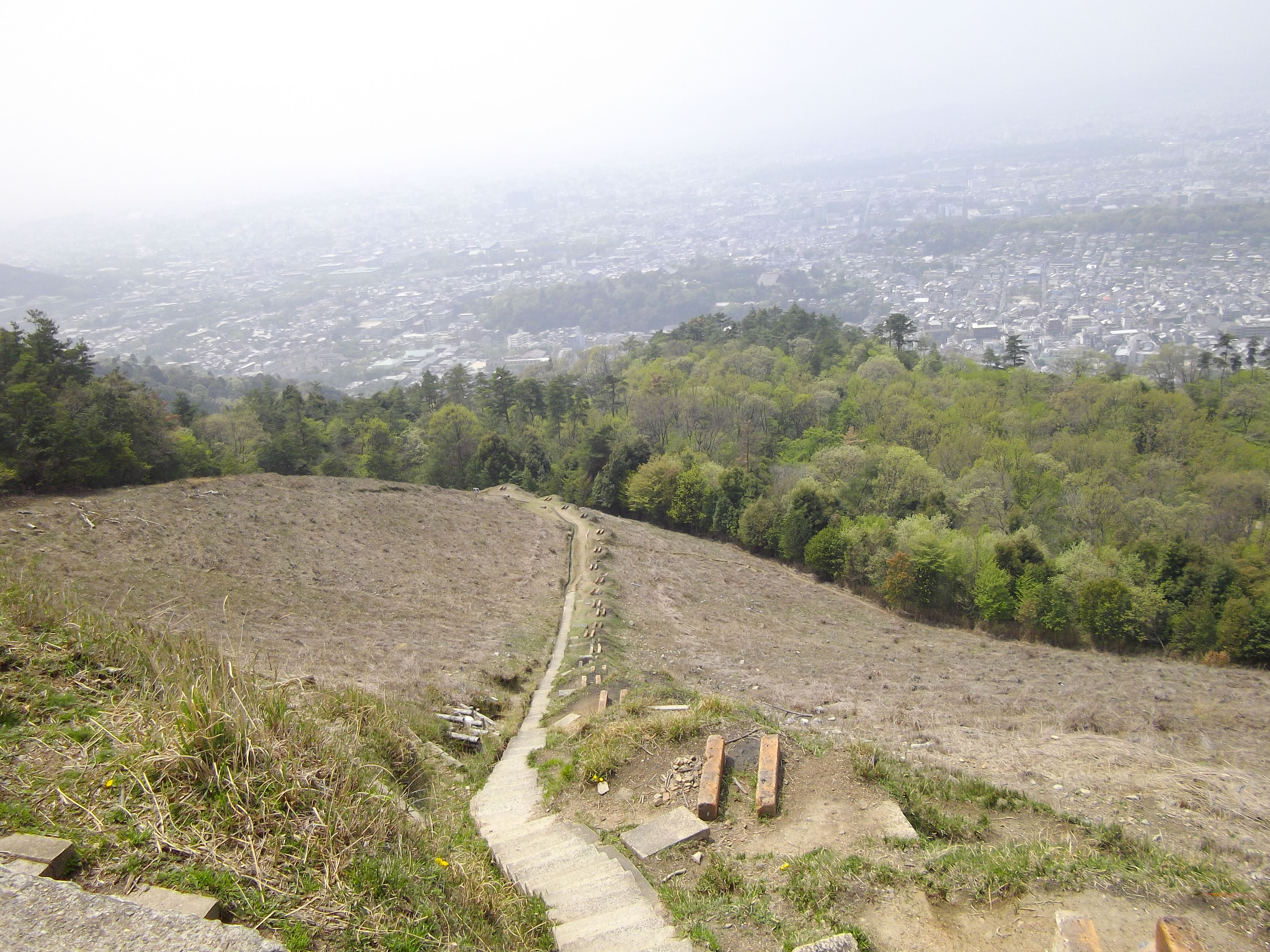 大文字火床・右の流れを金尾近辺から望む。